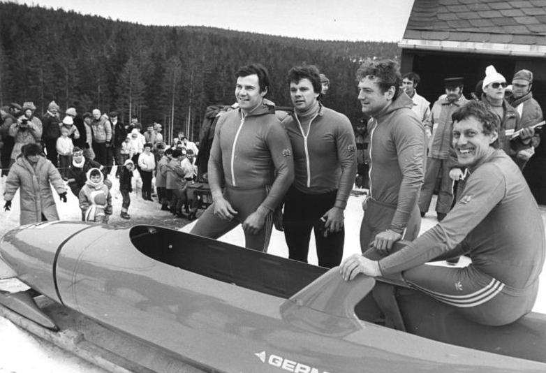 Wolfgang Hoppe, Bogdan Musiol, Ingo Voge, Dietmar Schauerhammer ADN-ZB Hiekel 22.3.87-wo-Dresden: DDR-Meisterschaften im Viererbob-DDR-Meister wurden auf der Rennschlitten- und Bobbahn Altenberg Wolfgang Hoppe, Bogdan Musiol, Ingo Voge und Dietmar Schauerhammer. (vlnr) (ASK Oberhof).